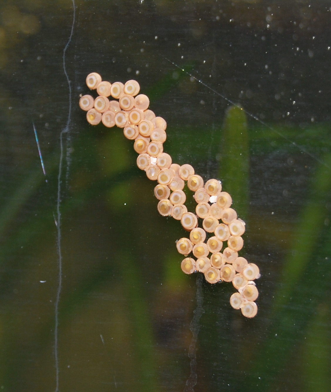 Egg av Scleromystax barbatus på glass - Eggs of Scleromystax barbatus on glass